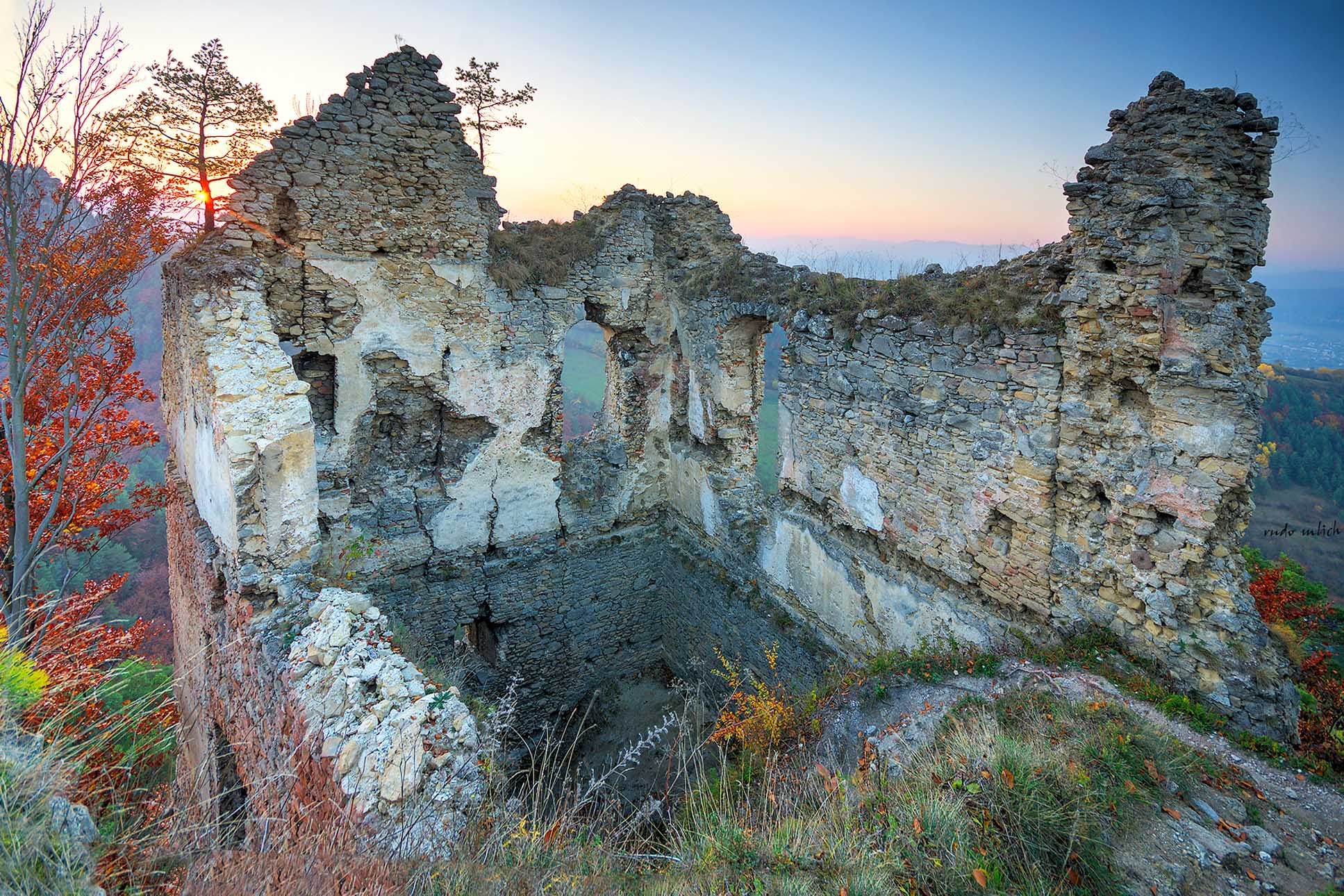 Palác